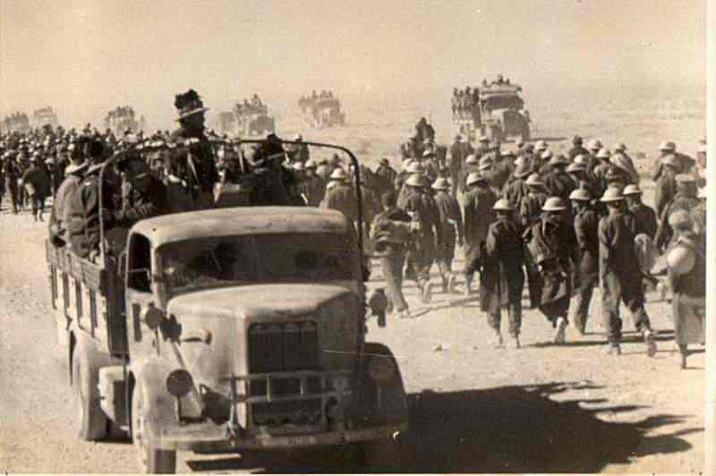 militari italiani in libia